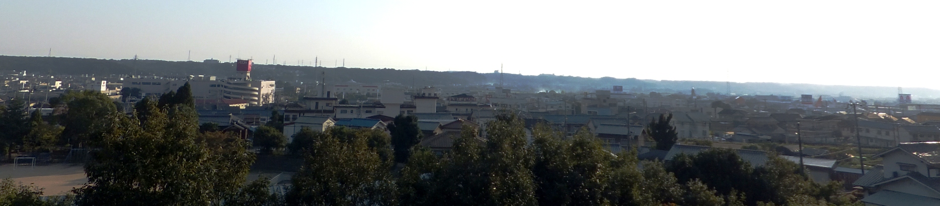 兵庫県三木市大村 遠景